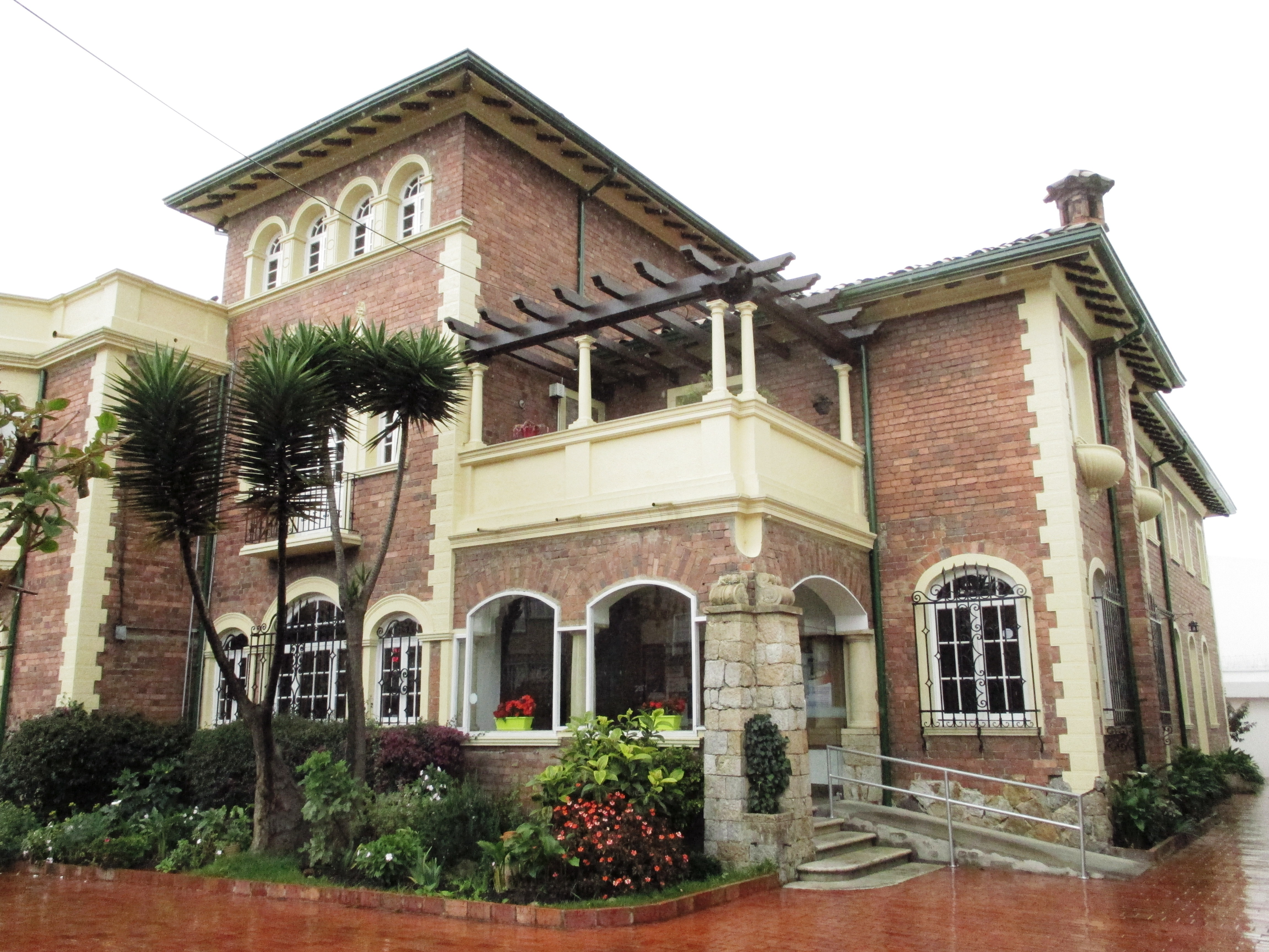 Instituto de Cultura Italiana, calle 35 No. 15-32, barrio Teusaquillo, centro de Bogotá, Colombia.